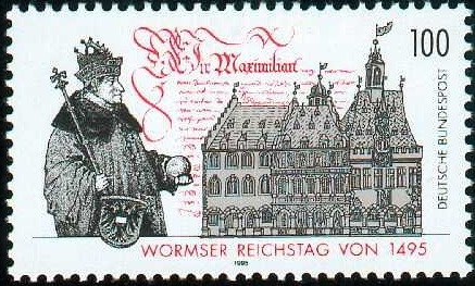 Reichstag de Worms 1495 / Wormser Reichstag 1495 (timbre RFA / Briefmarke BRD)